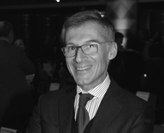 Auro Palomba